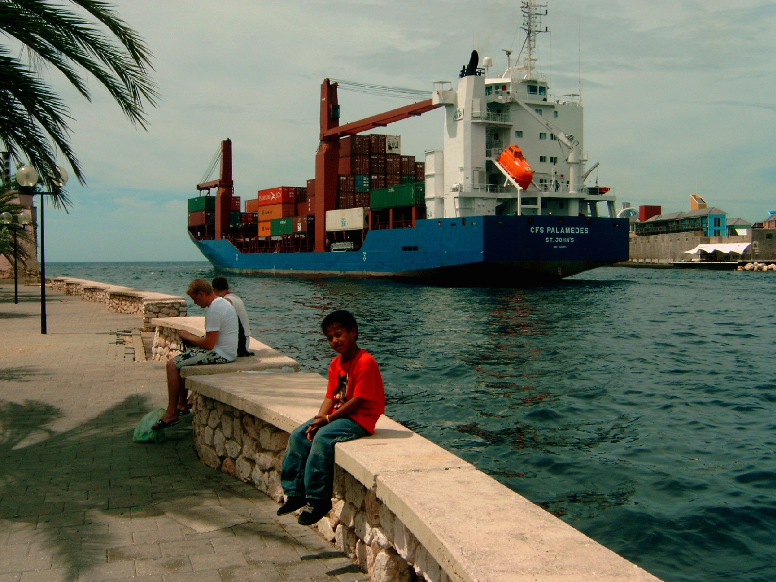 Containerschip CFS Palamedes verlaat de haven van Curaçao. Eigen opname, okt. 2005. IMO Number: 9322841 MMSI Number: 339400114 Callsign: 6YRJ2 Length: 127 m Beam: 20 m